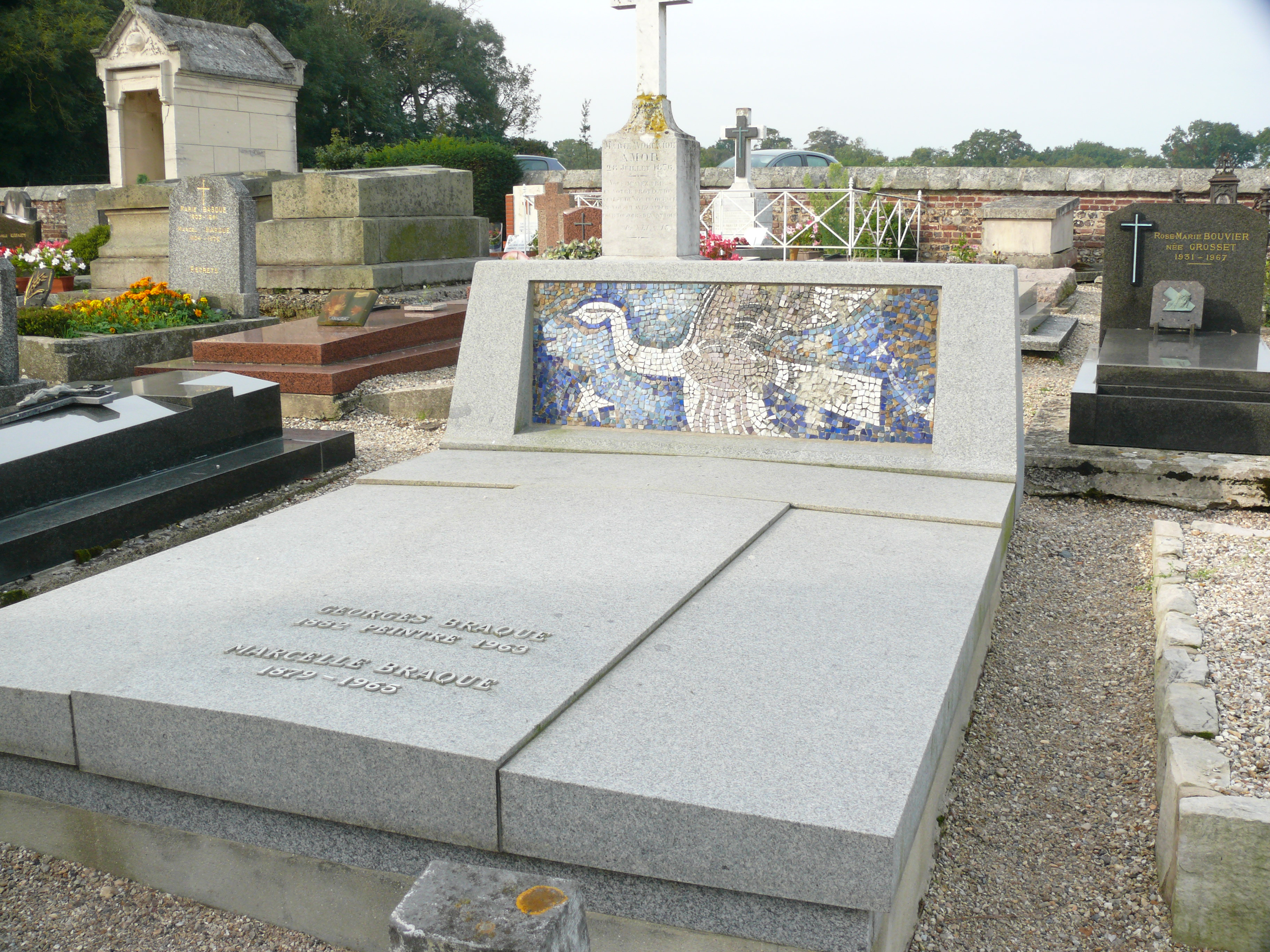 Georges Braque , Grave Tomb Cimetière marin de Varengeville-sur-Mer